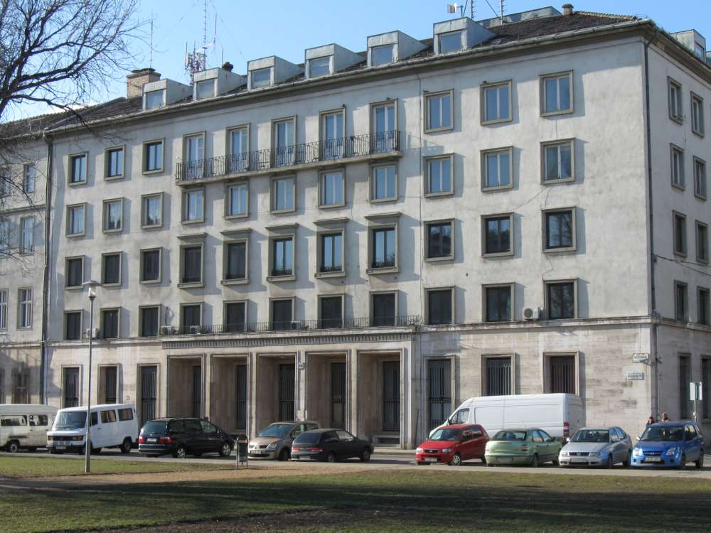 A volt MSZMP-székház épülete (Budapest, VIII. kerület, Köztársaság tér 26.)